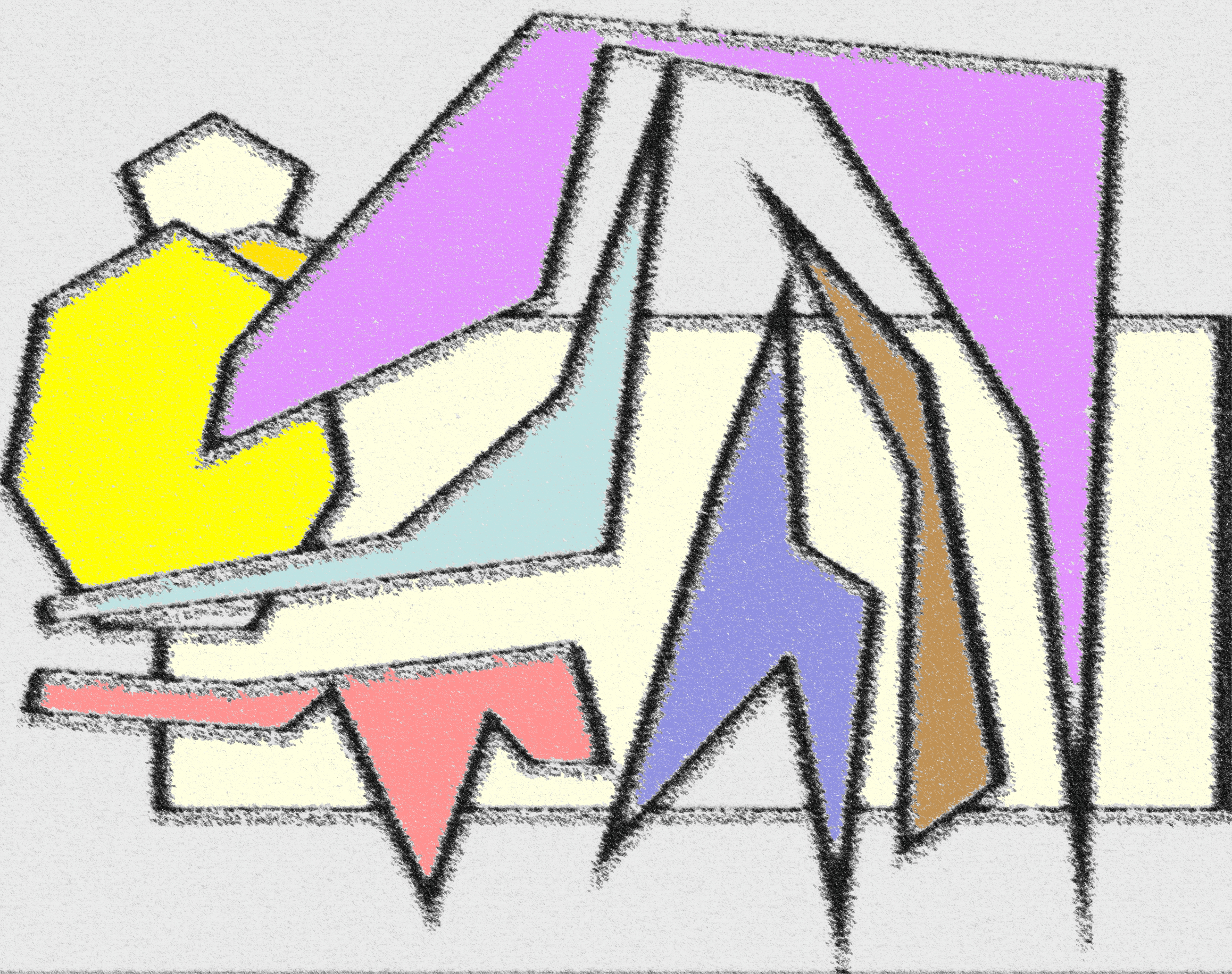 Das Bild zeigt die Entwurfsskizze für einen 10-Farben-Holzschnitt.